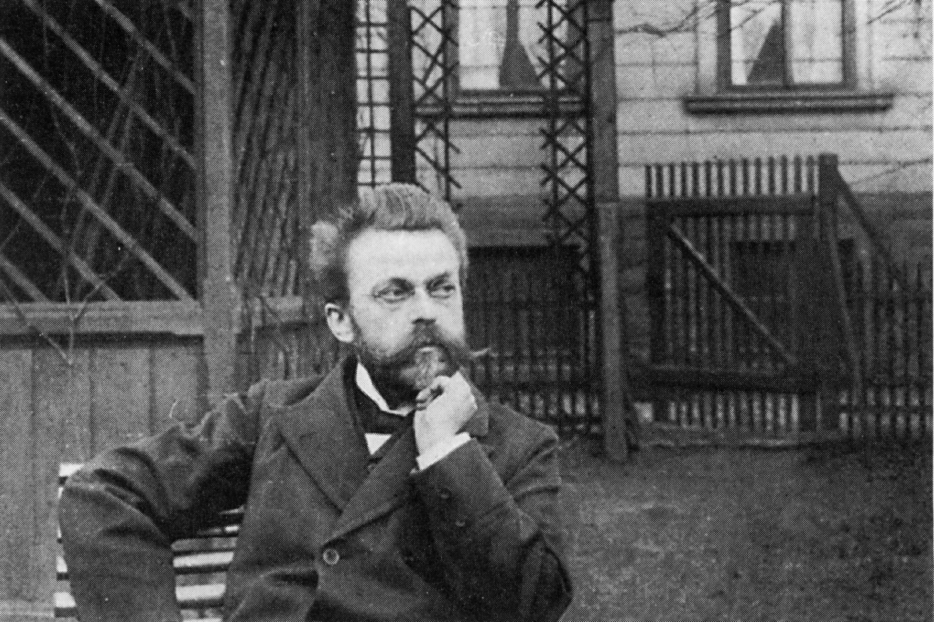 Max Spohr (November 17, 1851 - November 11, 1905)